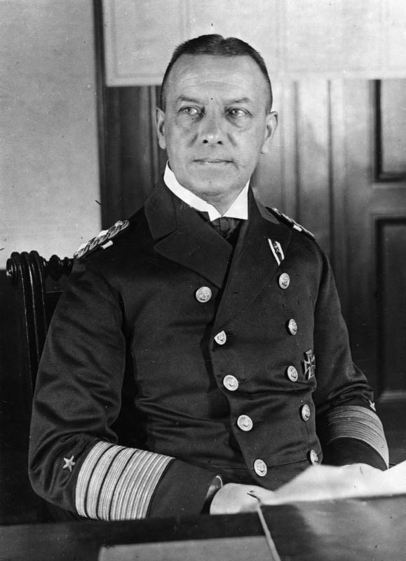 Admiral [Erich] Raeder, der neue Chef der Marineleitung, der heute (4.10) sein Amt antritt 24543.